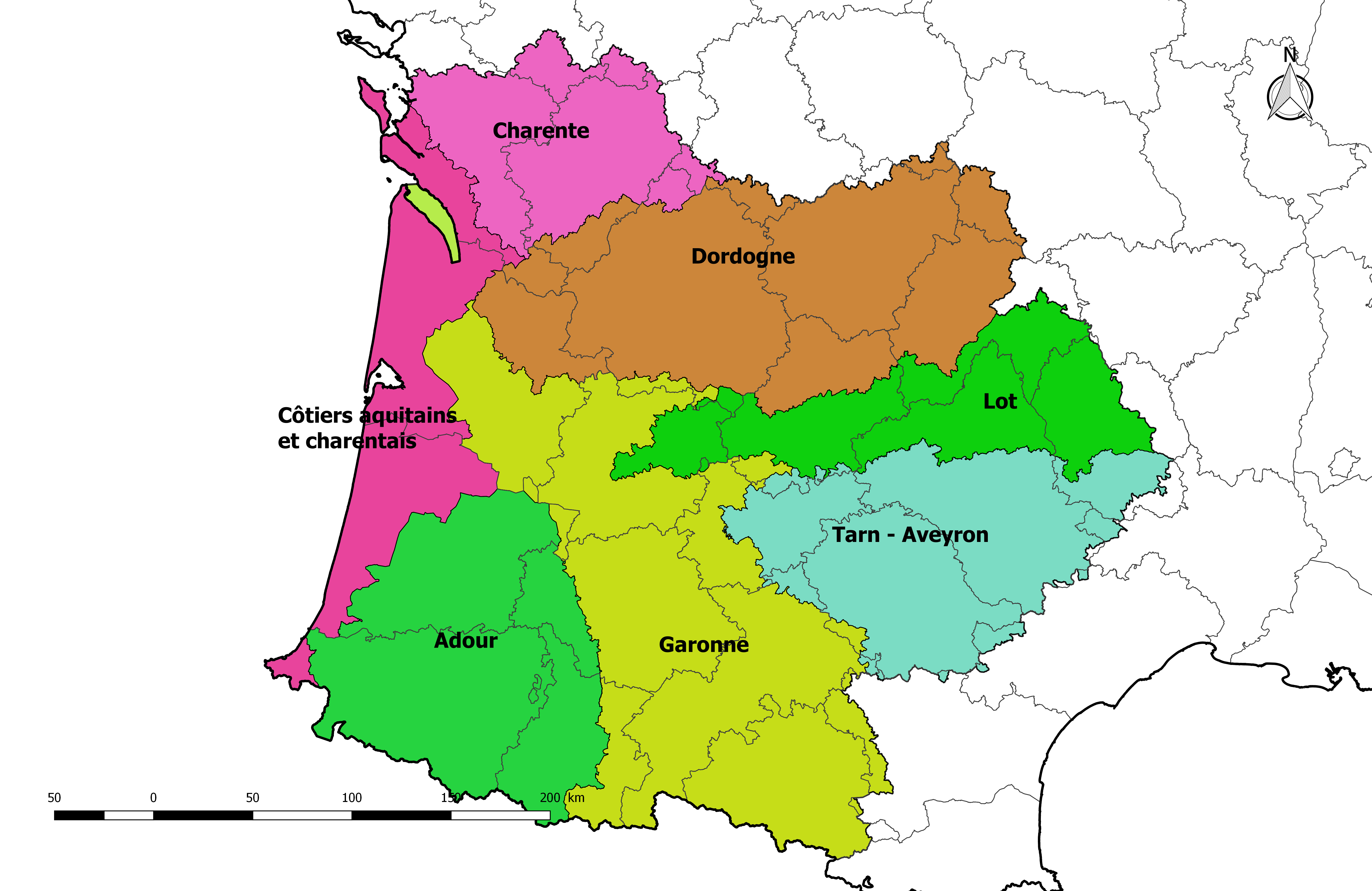 Carte de la circonscription de bassin Adour-Garonne en France, avec les sous-bassins qui la composent.